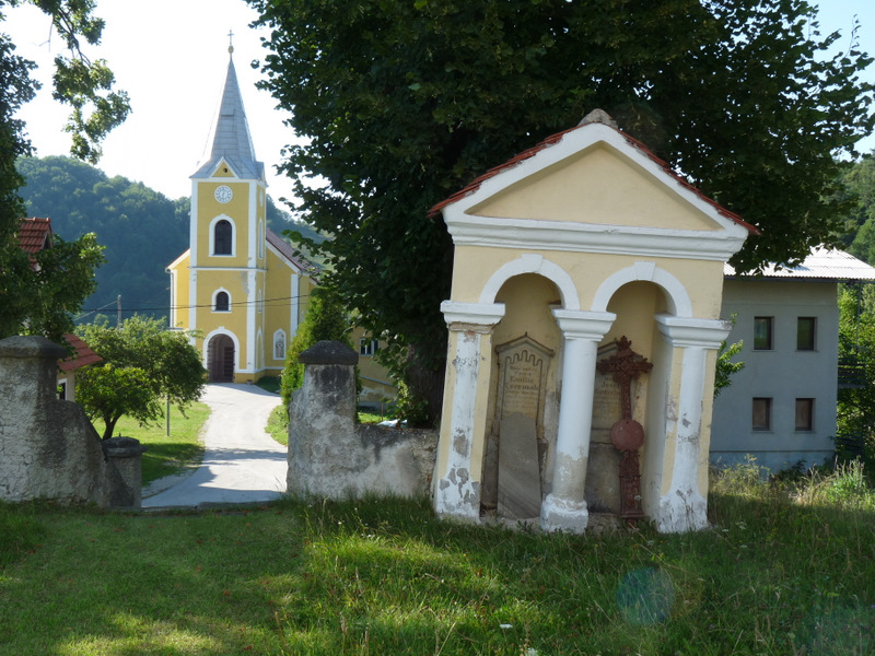 Pogled na Žusem